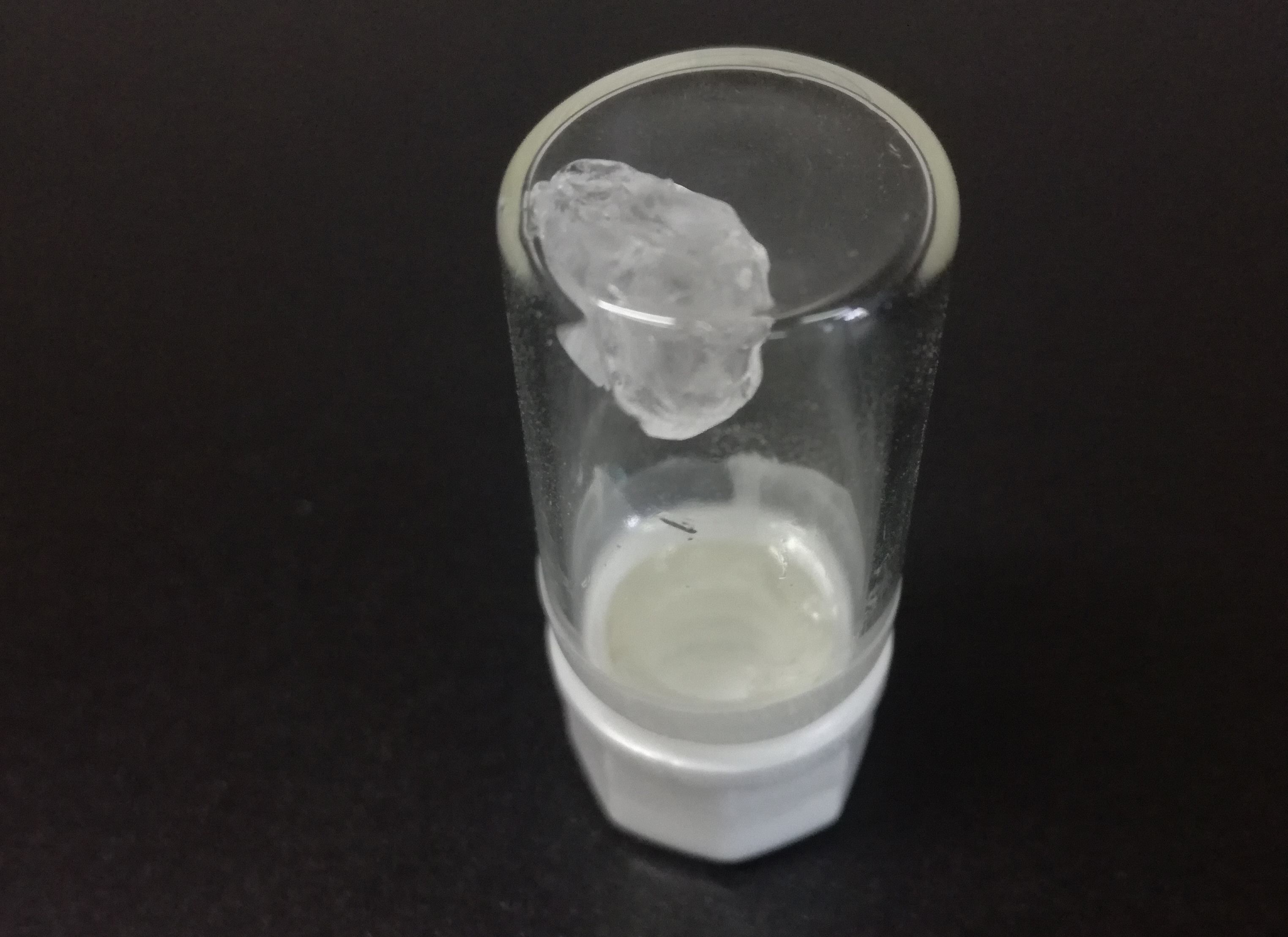 Charakterystyczny wygląd lipidowej fazy kubicznej